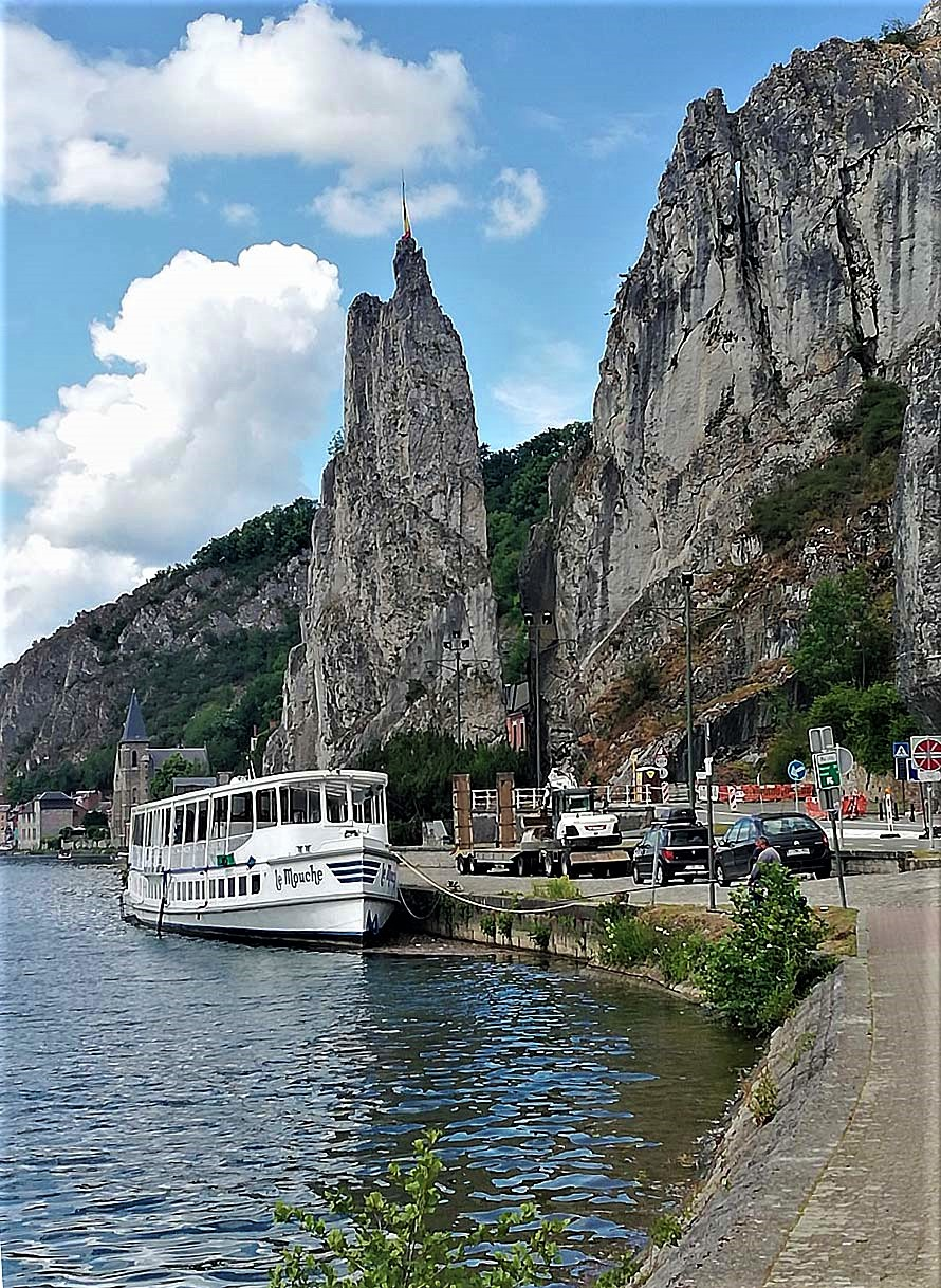 Le célèbre rocher bayard de Dinant.